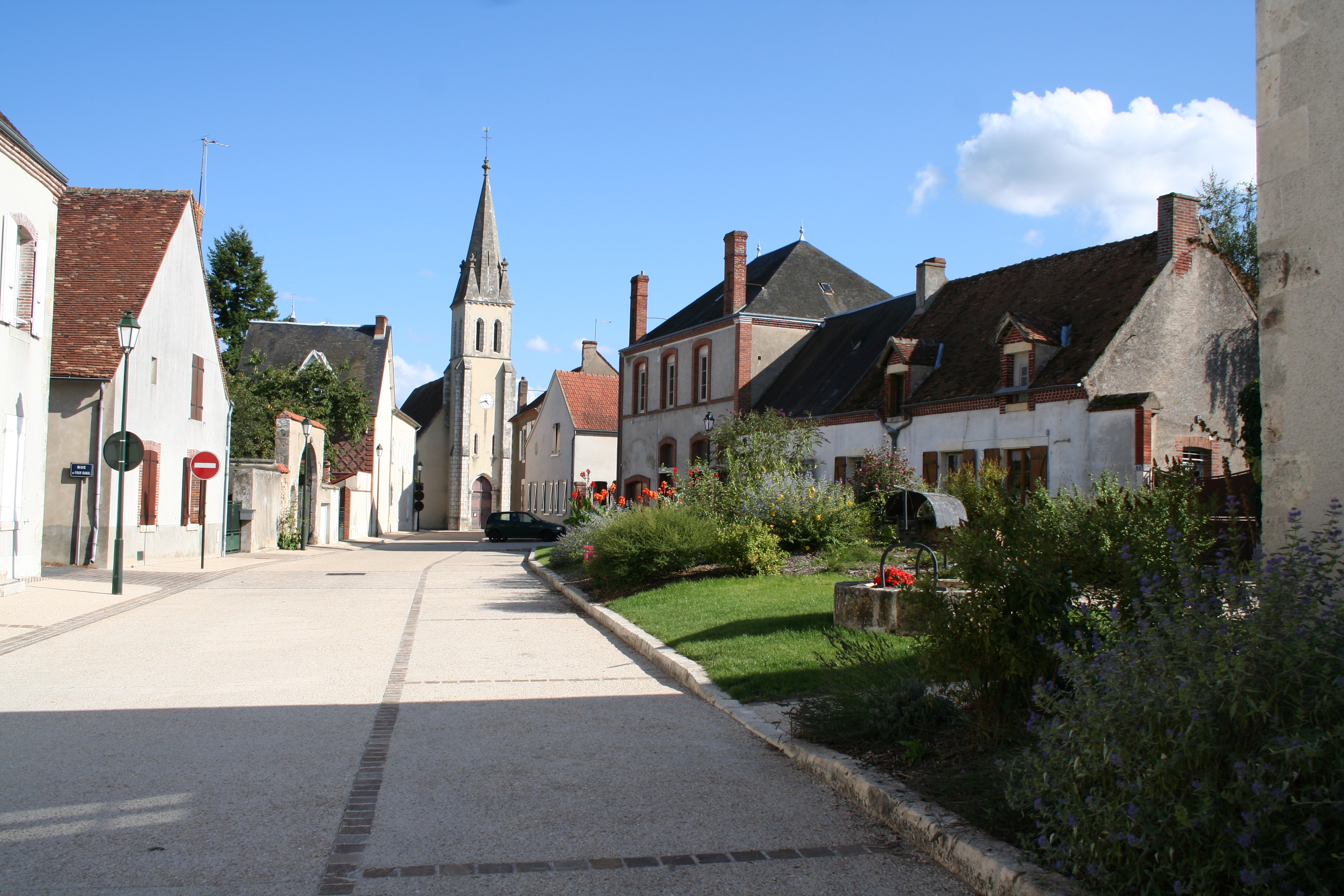 Vue prise en direction de l'Est, depuis la grille du château; on peut y voir le clocher de l'église actuelle et les maisons bordant la rue de l'église.